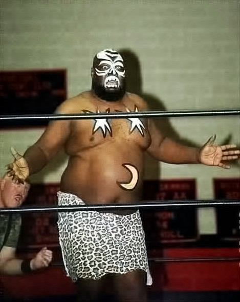 Wrestling legend Kamala on 3/28/09 from Franklin PA